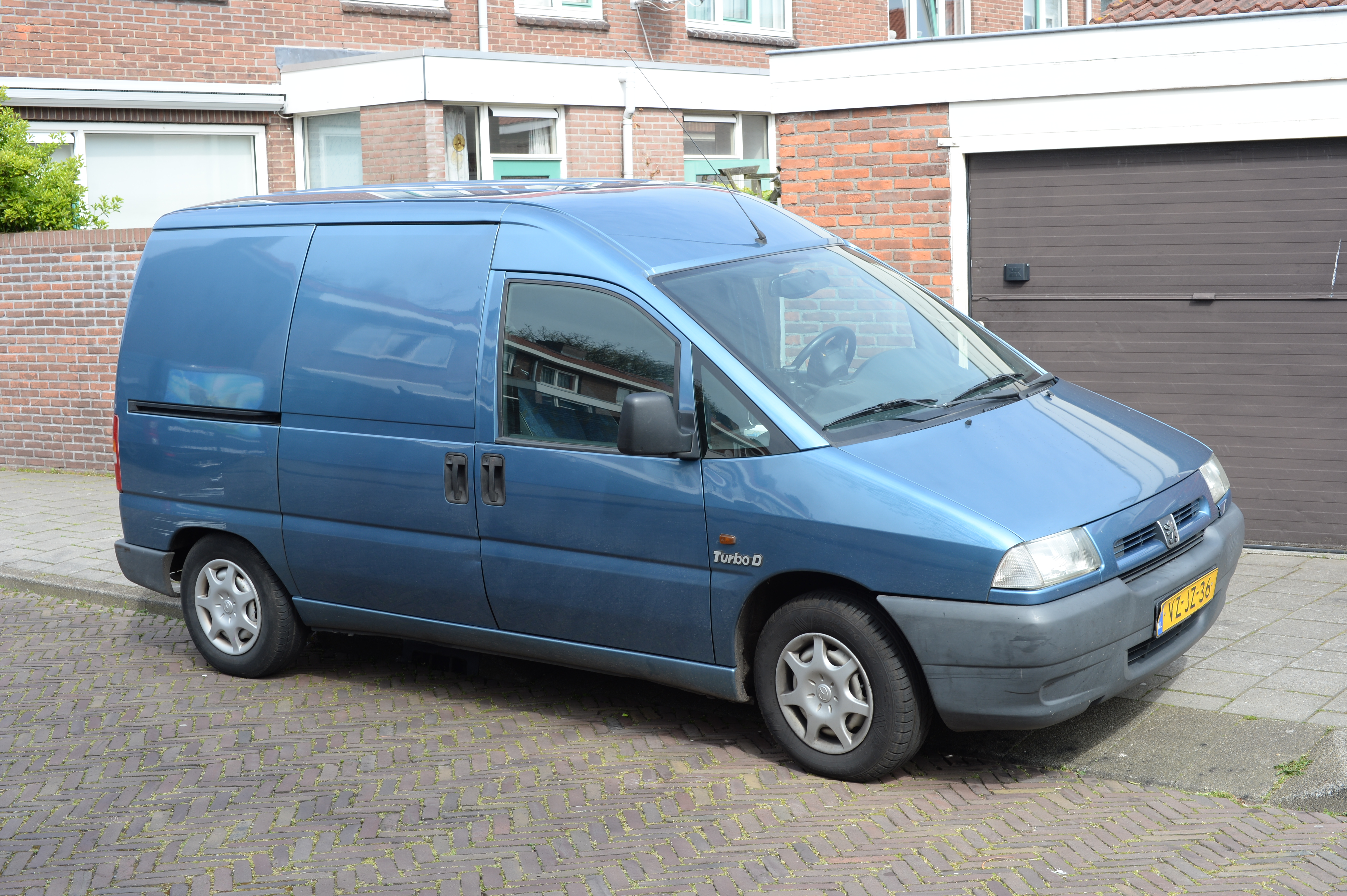 1998 Peugeot Expert 220C CF 1.9 TD